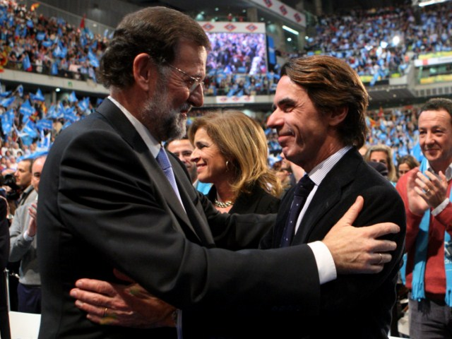 18 nov. Cierre de campaña en el Palacio de los Deportes